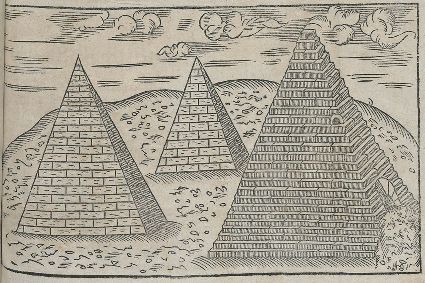 Die Pyramiden von Gizeh. Holzschnitt aus Johann Helffrichs Reisetagebuch Kurtzer vnd warhafftiger Bericht/ Von der Reyß aus Venedig nach Hierusalem.